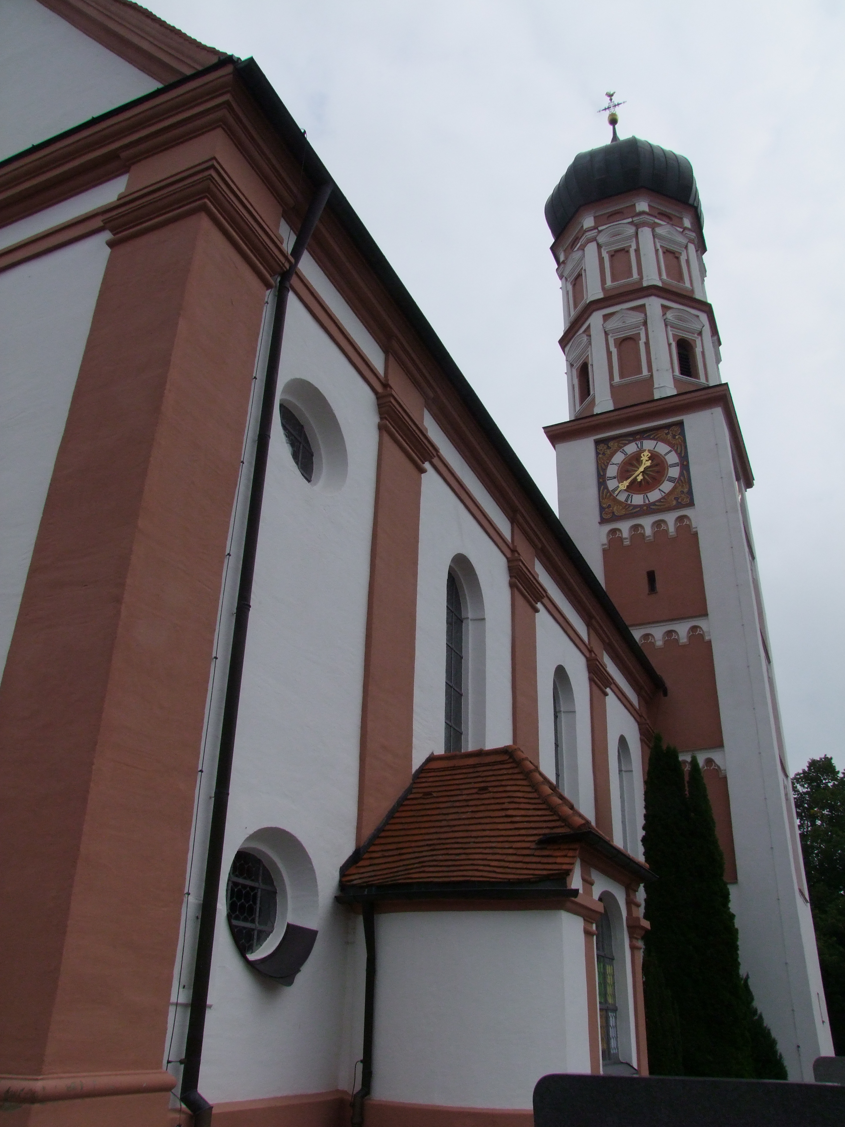 St. Michael in Stockach in Schwaben